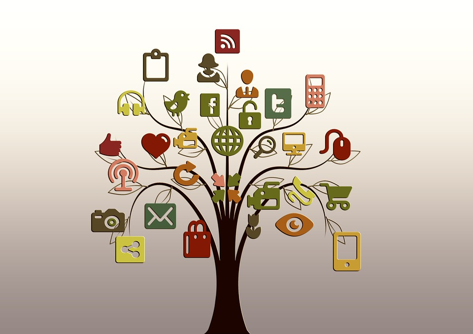 "La ramificación inmensa ramificación de las redes sociales"